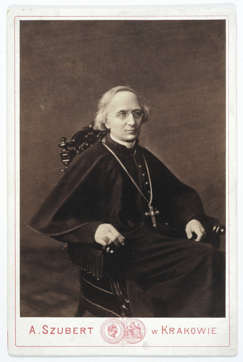 Albin Dunajewski, Polish bishop